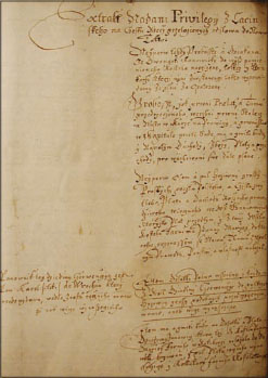 Dokument fundacyjny z 1416 roku dla kolegiaty raciborskiej; wzmiankowane są Czerwięcice oraz ich ówczesny właściciel Karel di Wrochin